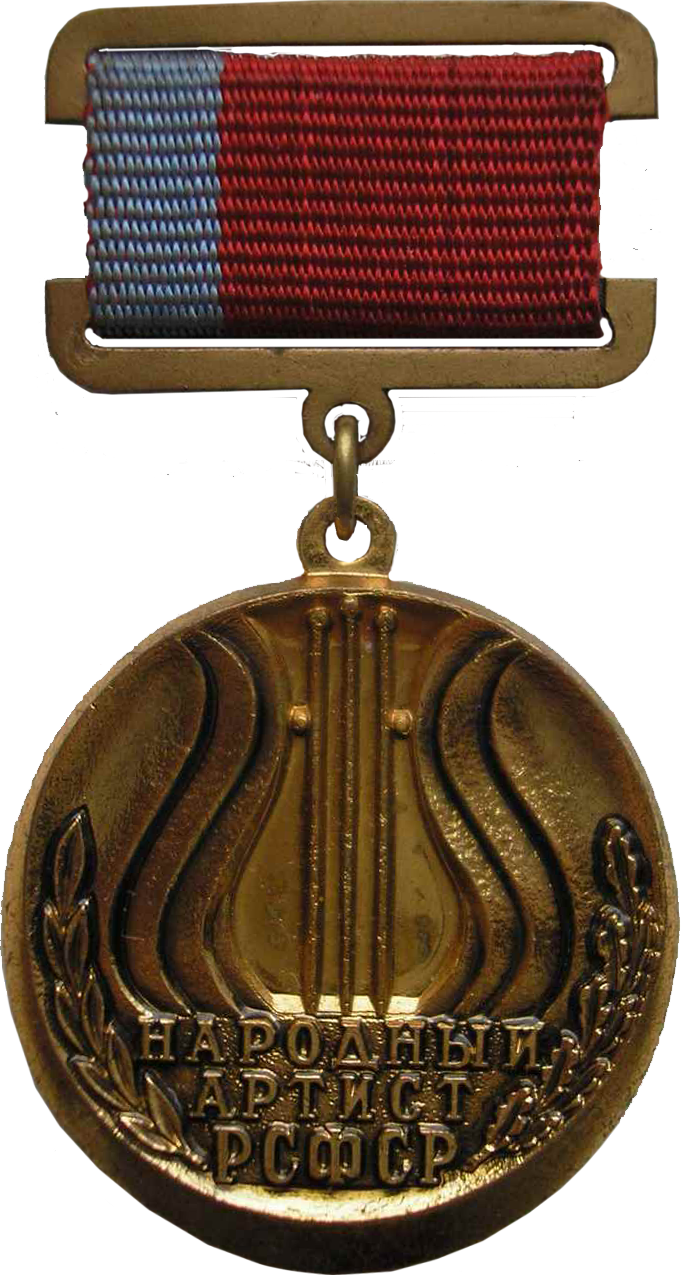 нагрудный знак «Народный артист РСФСР»